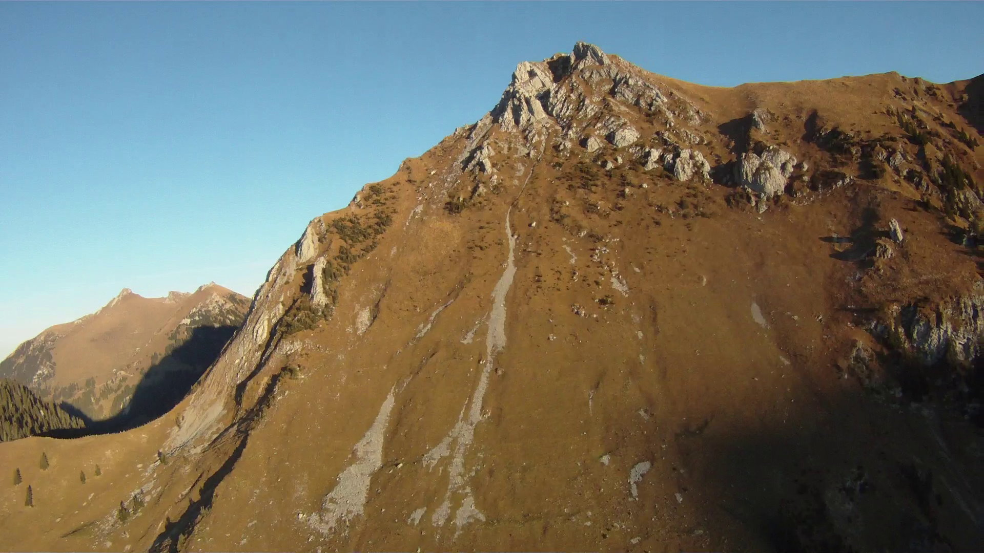 Westhang